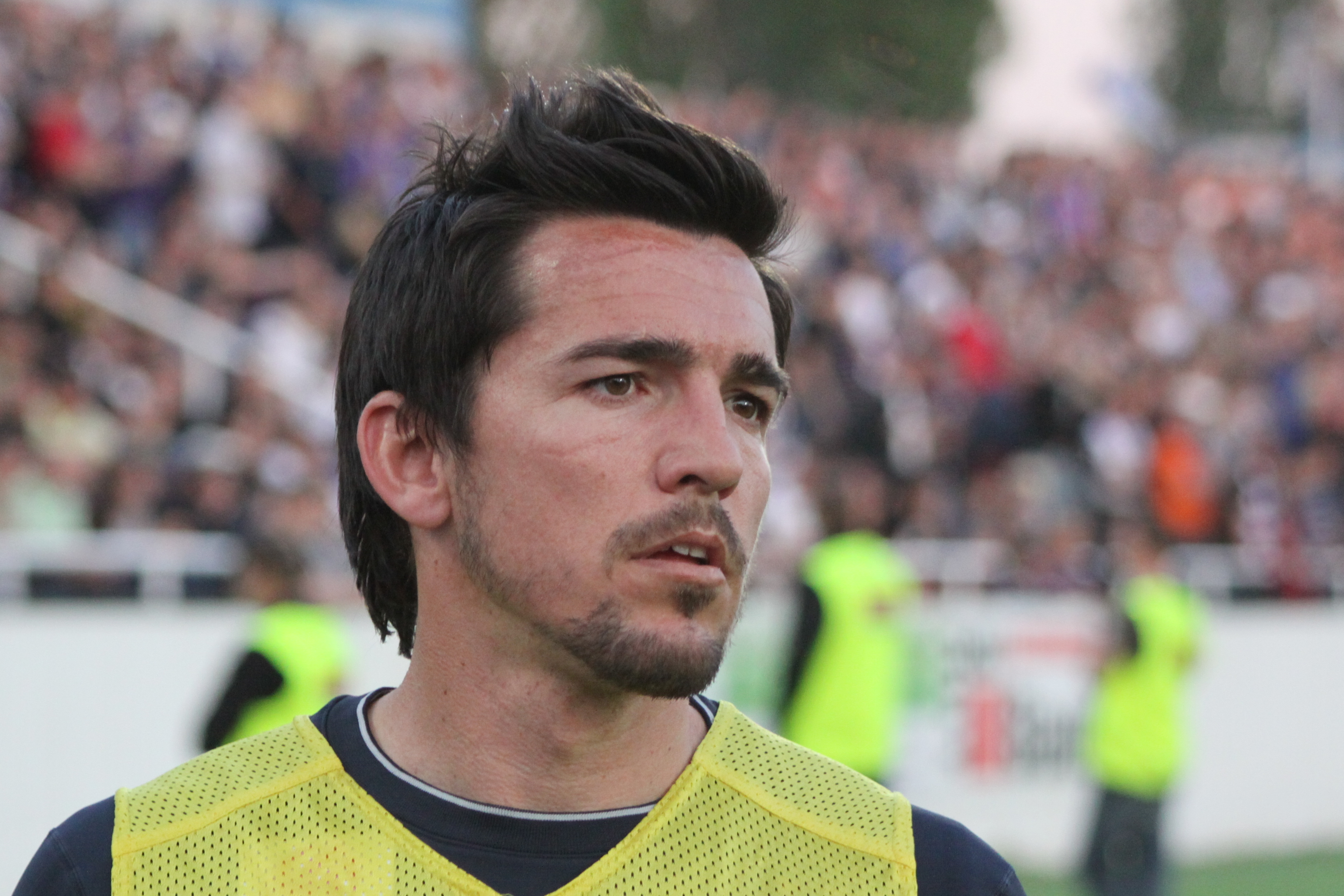 Fernando Troyansky (quer) - FK Austria Wien